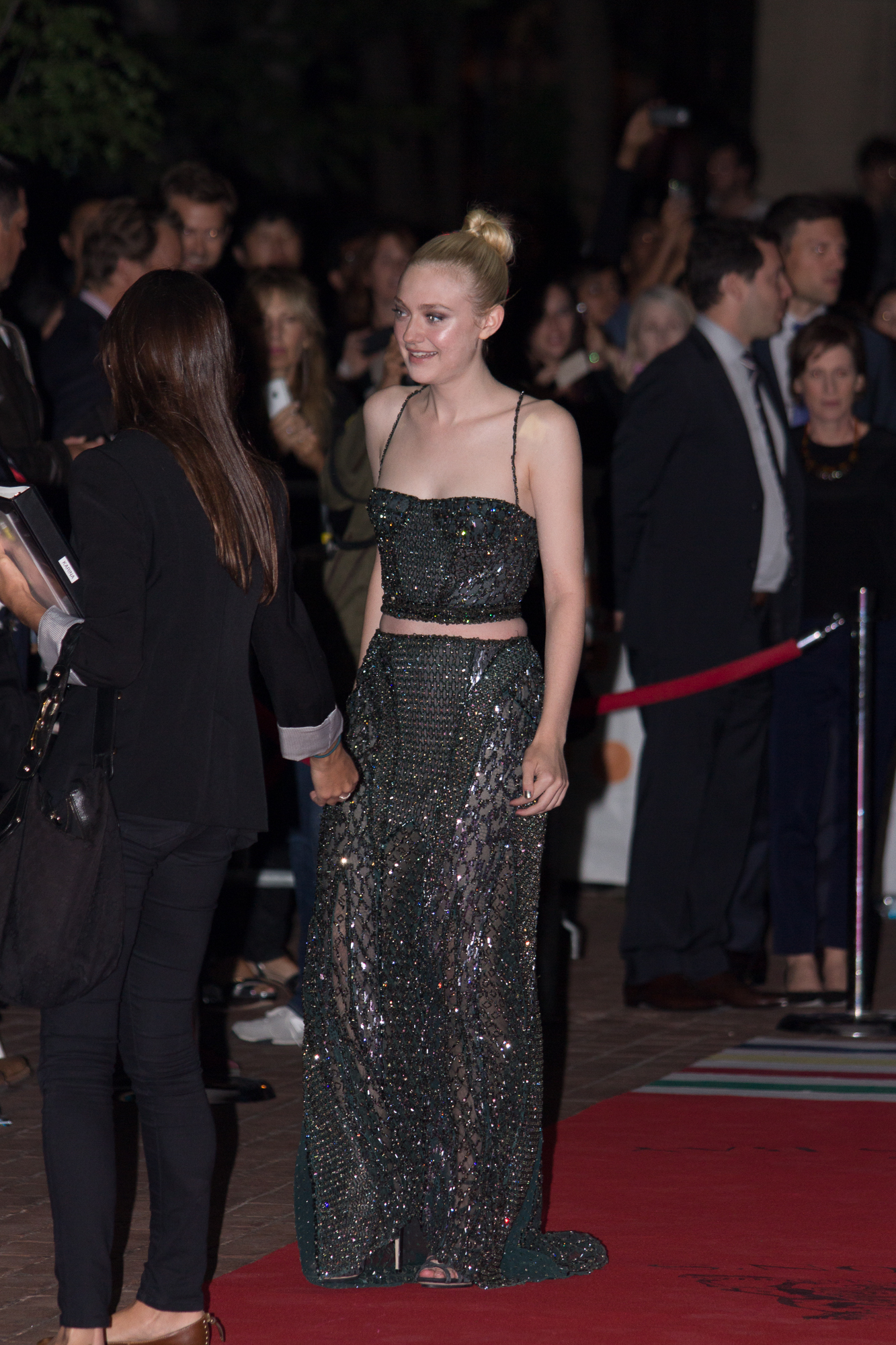 _MG_7013.jpg